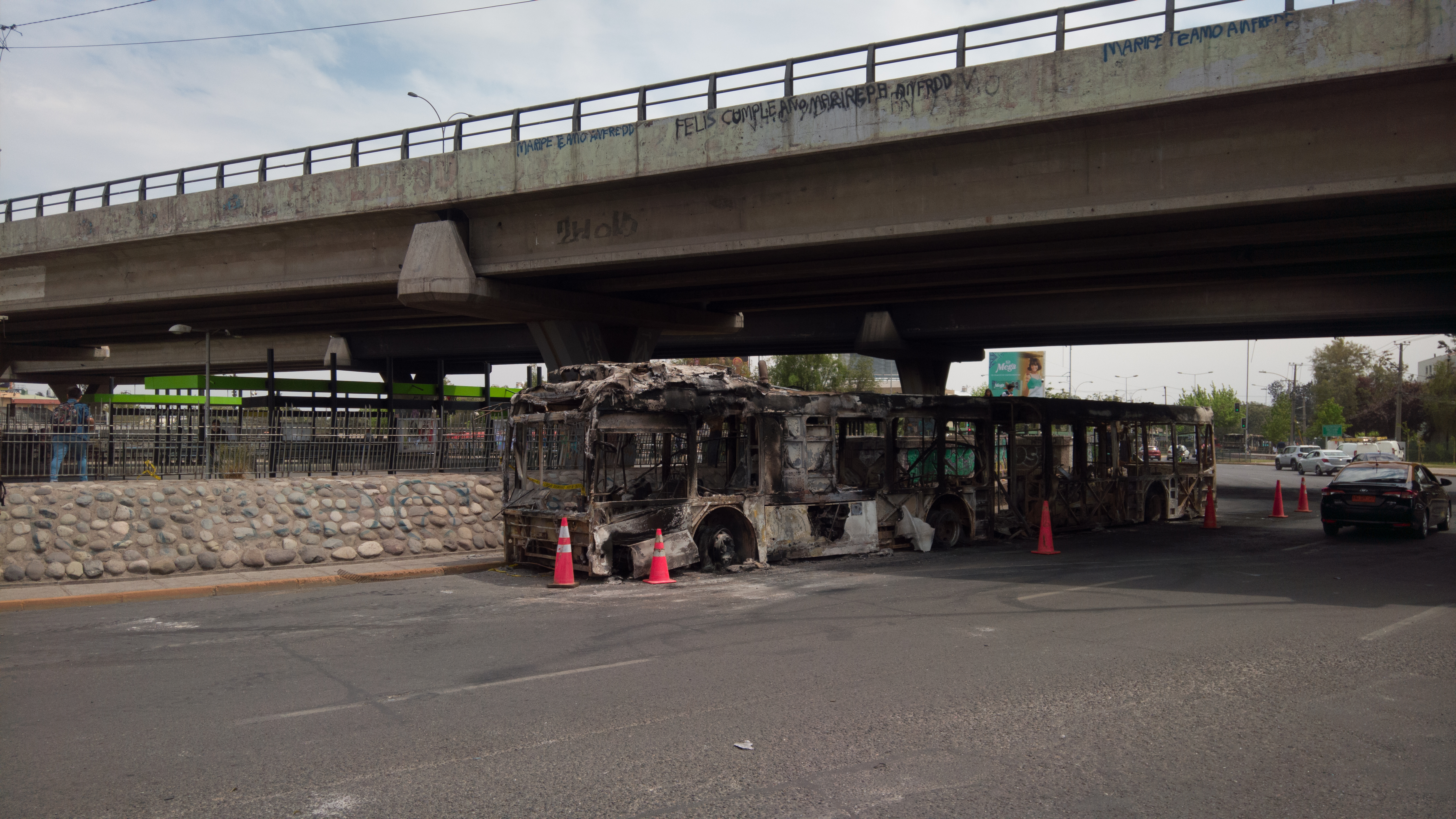 Bus de Transantiago quemado la noche de 2019.10.18 en la rotonda Grecia (Santiago de Chile).